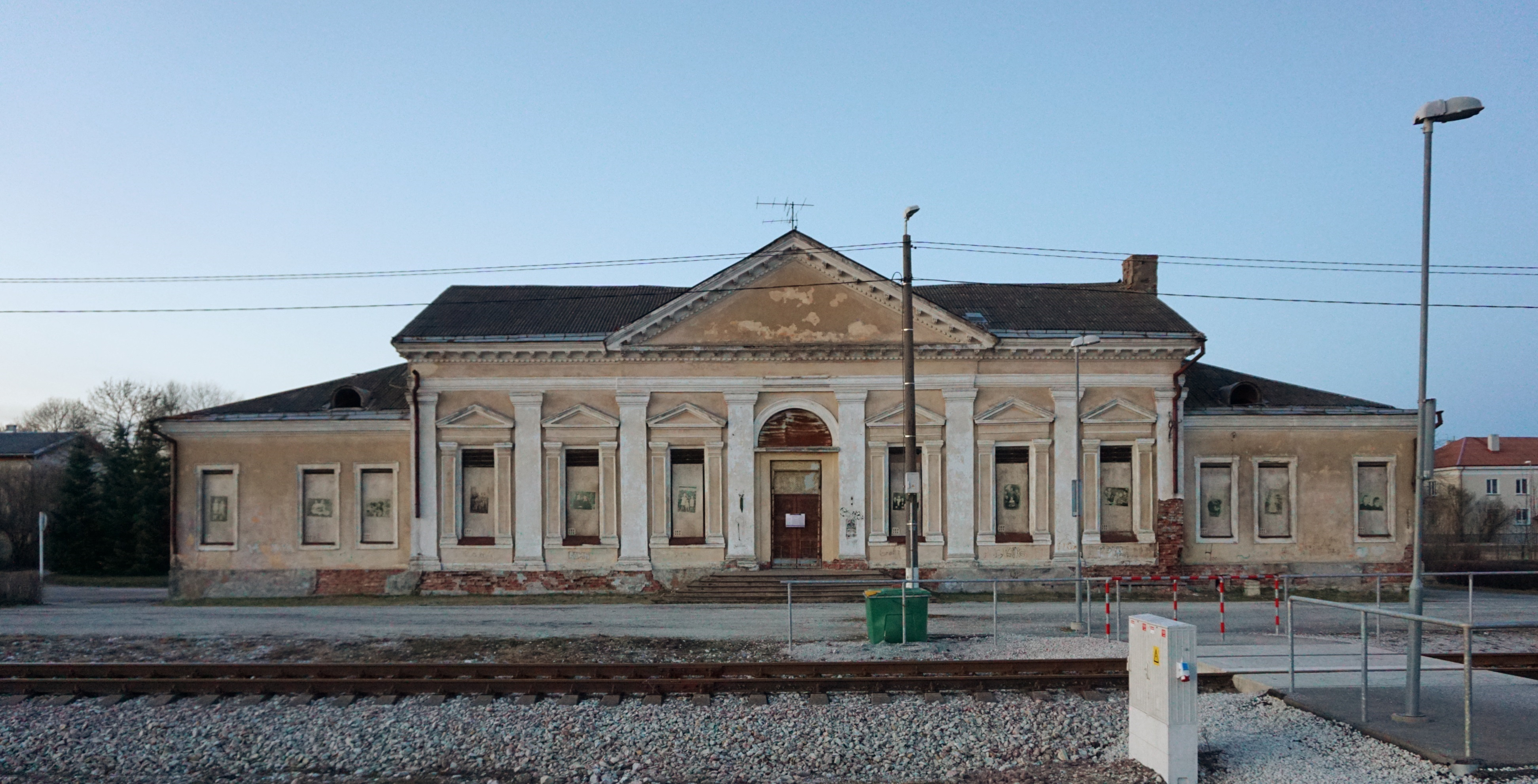 Jõhvi Stalinistlik jaamahoone